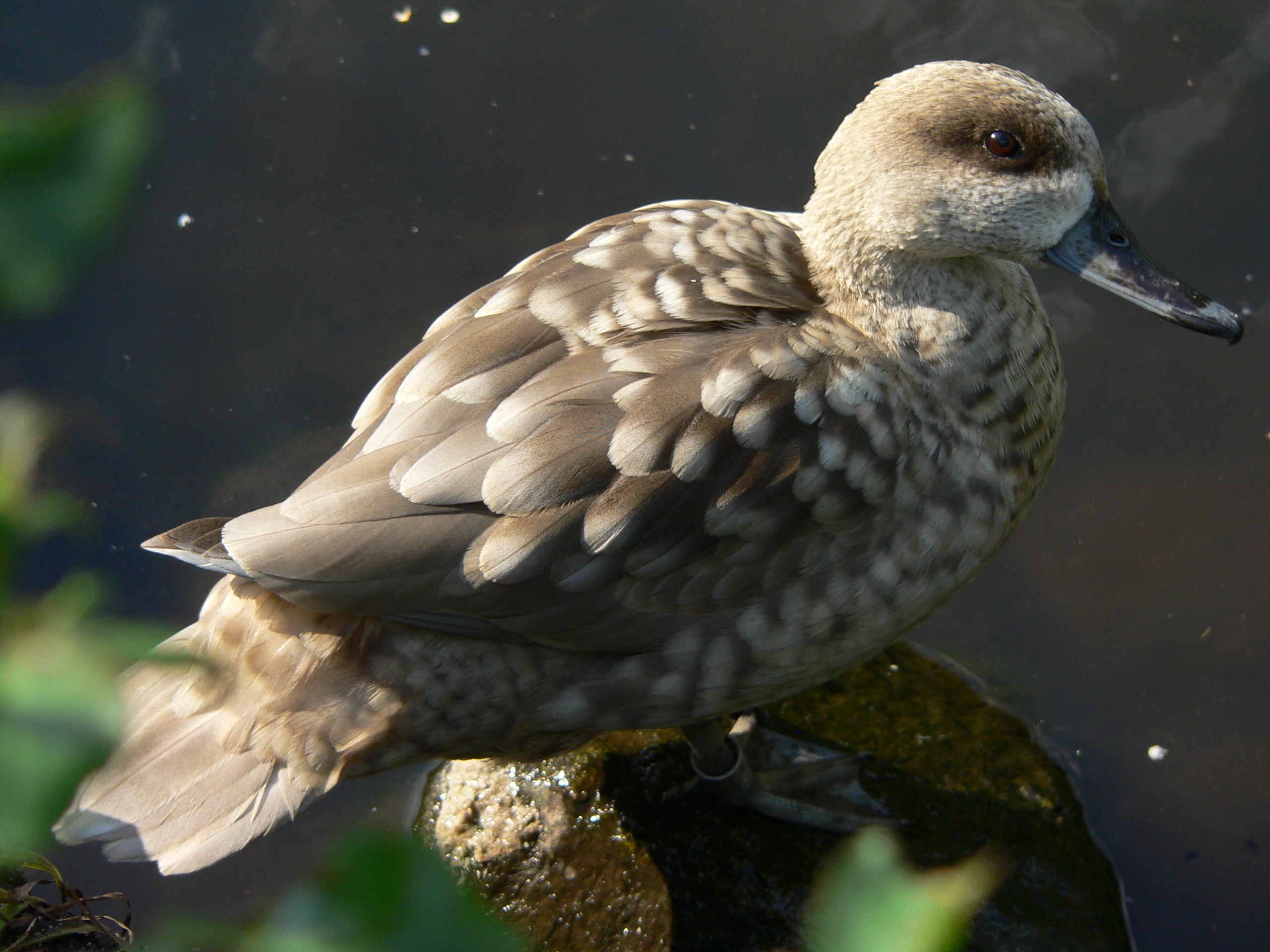 Marmelente